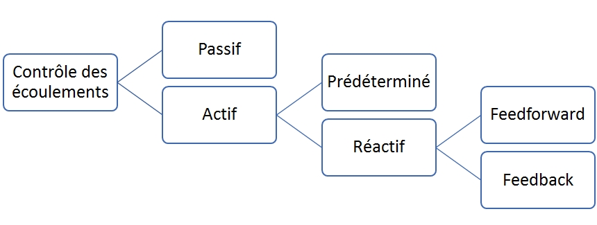 Classification des stratégies de contrôle des écoulements - inspiré de M. Gad-El-Hak. « Flow Control : The Future ». Dans : Journal of Aircraft 38.3 (2001), p. 402–418. issn : 0021-8669. doi : 0.2514/2.2796.